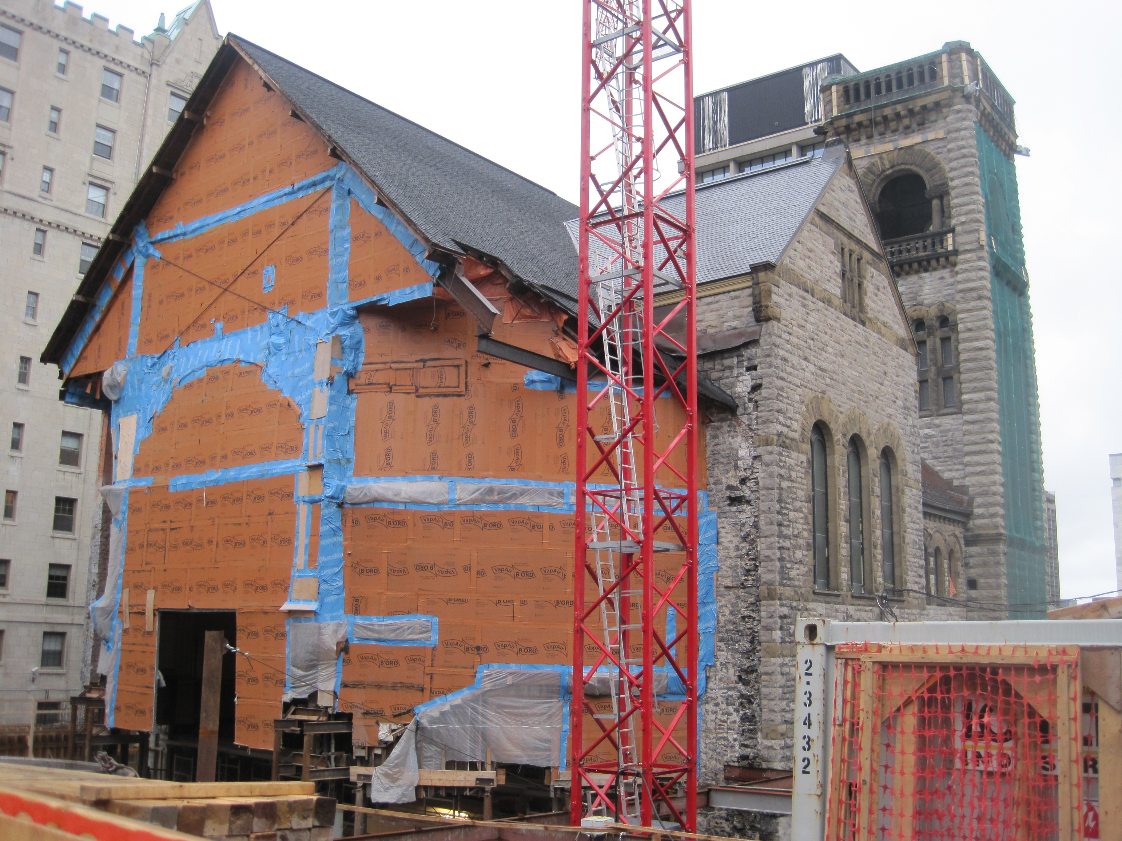 Travaux de rénovation de l'église Erskine and American à Montréal et mise en place de la future galerie souterraine du Musée des beaux-arts de Montréal